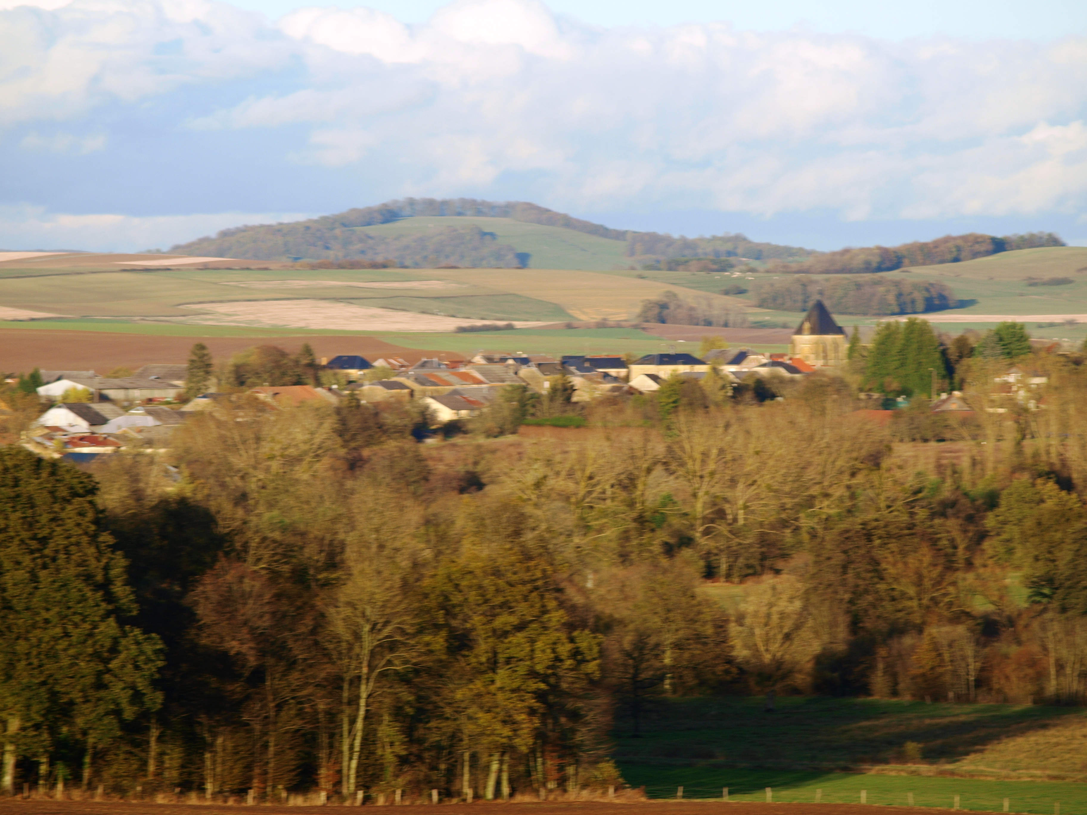 Brieulles-sur-Bar (Ardennes, France) ; vue générale.